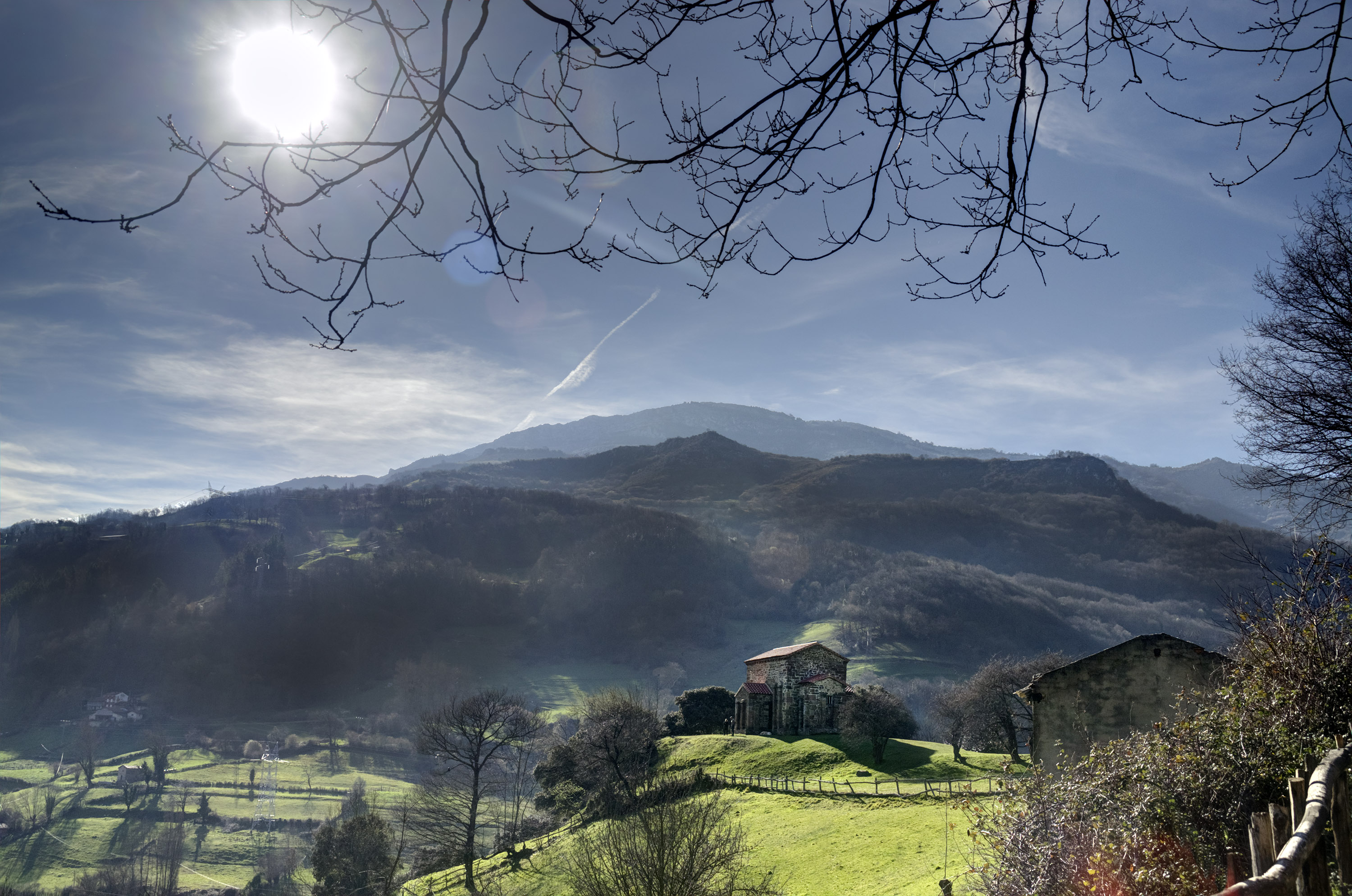 Iglesia prerrománica construida en el siglo IX (año 852). Está en la parroquia de Felgueras, concejo de Lena (Asturias, España). RI-51-0000050.